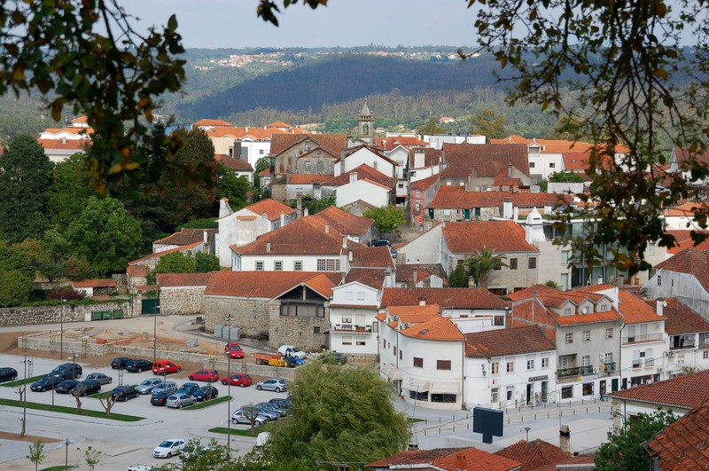 Cidade de Santa Comba Dão